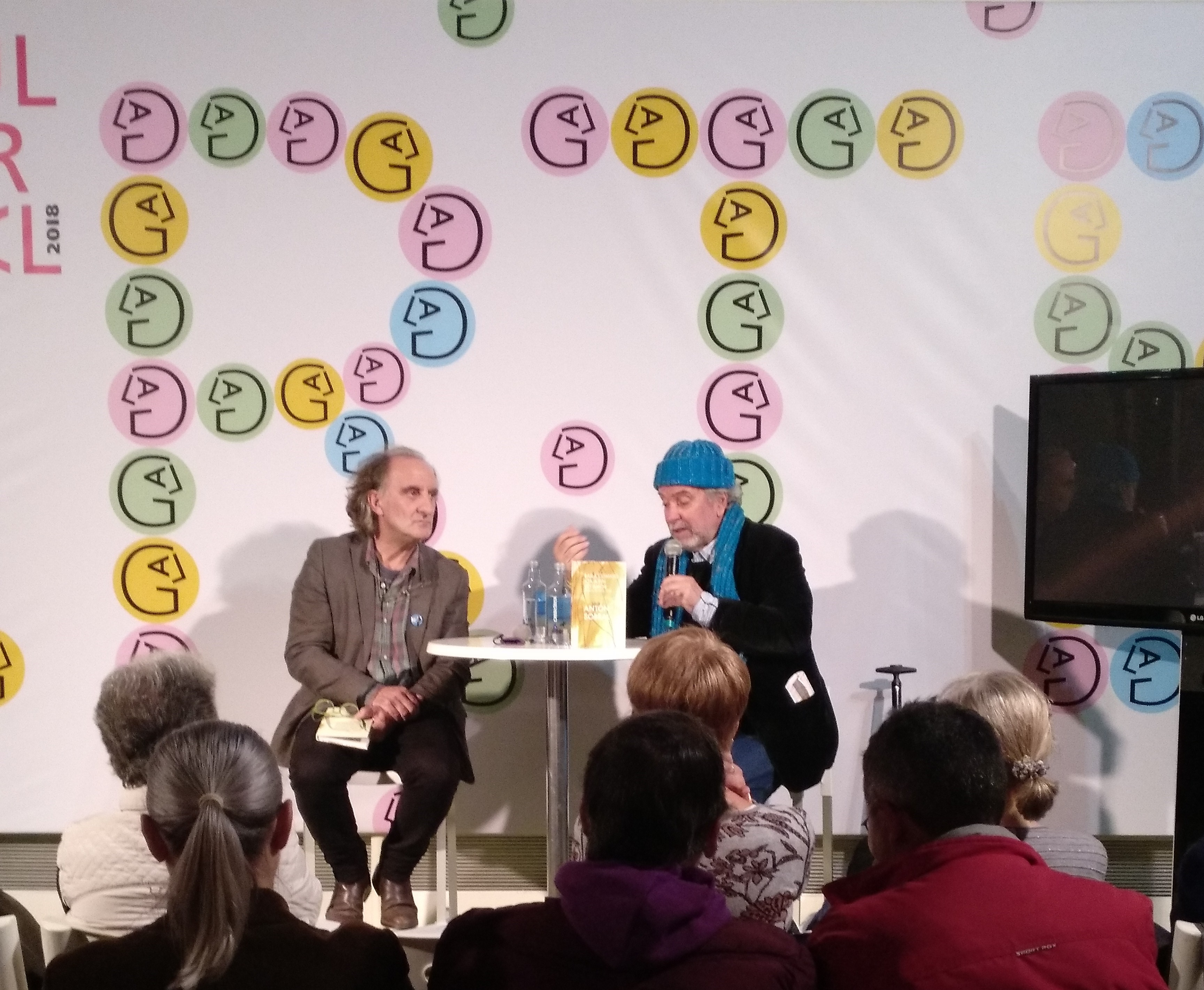 Xaime Toxo e Antón Sobral presentan "Baila comigo ata a fin do amor", libro de pomas de Sobral no Culturgal de Pontevedra o 02 de decembro de 2018